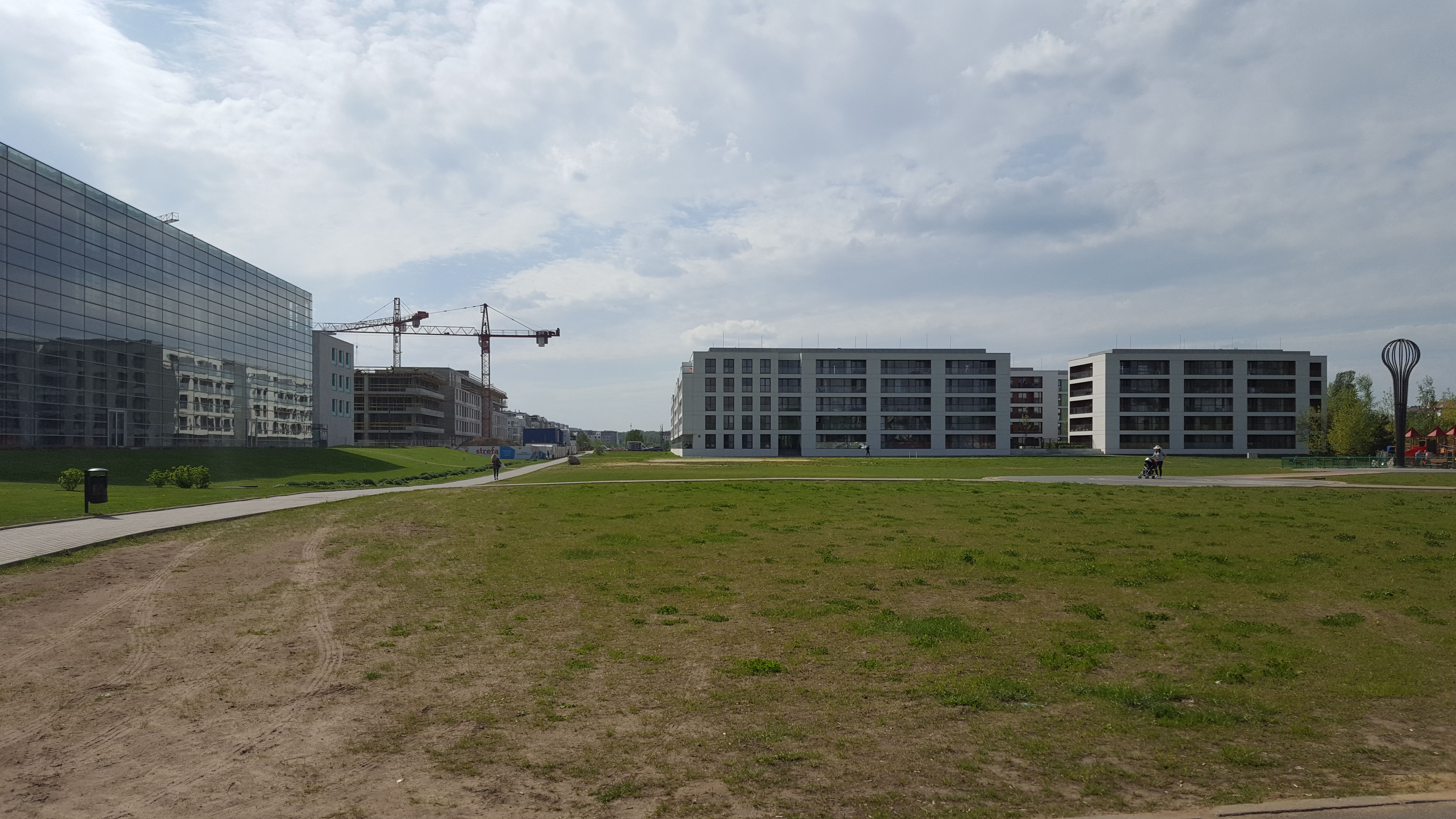 Beach Wilanow